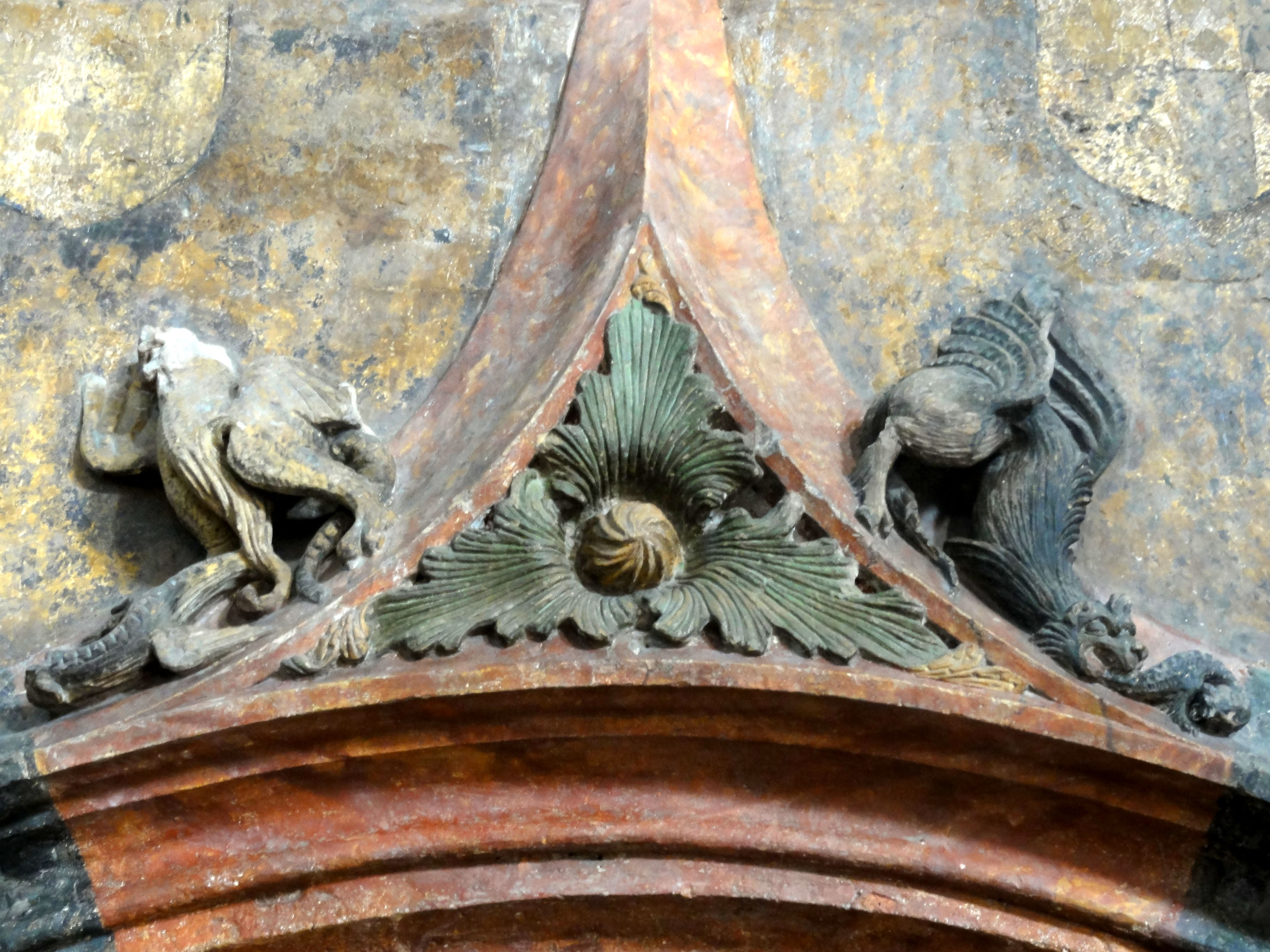 Croisillon nord, porte de la sacristie détail.